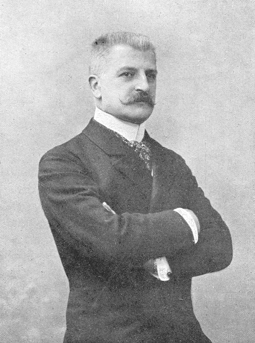 Luigi de Campi (1846-1917)